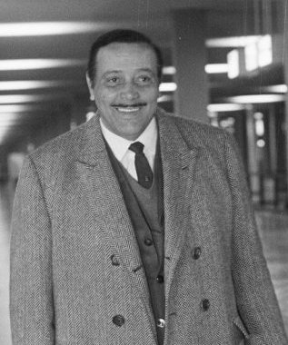 Benfica-trainer Otto Gloria arriveert op Schiphol